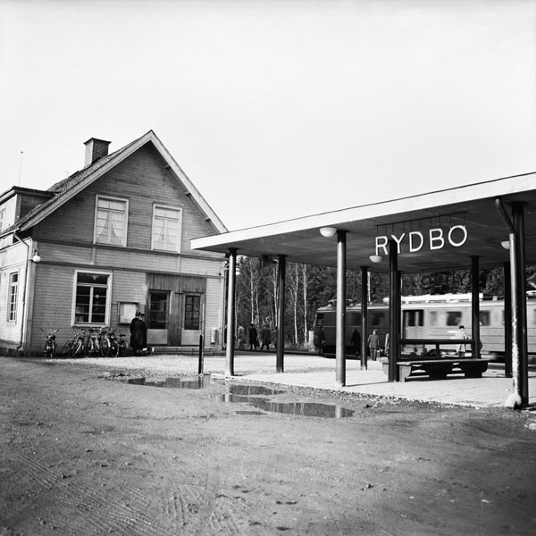 Rydbo station vid 1950-talets slut